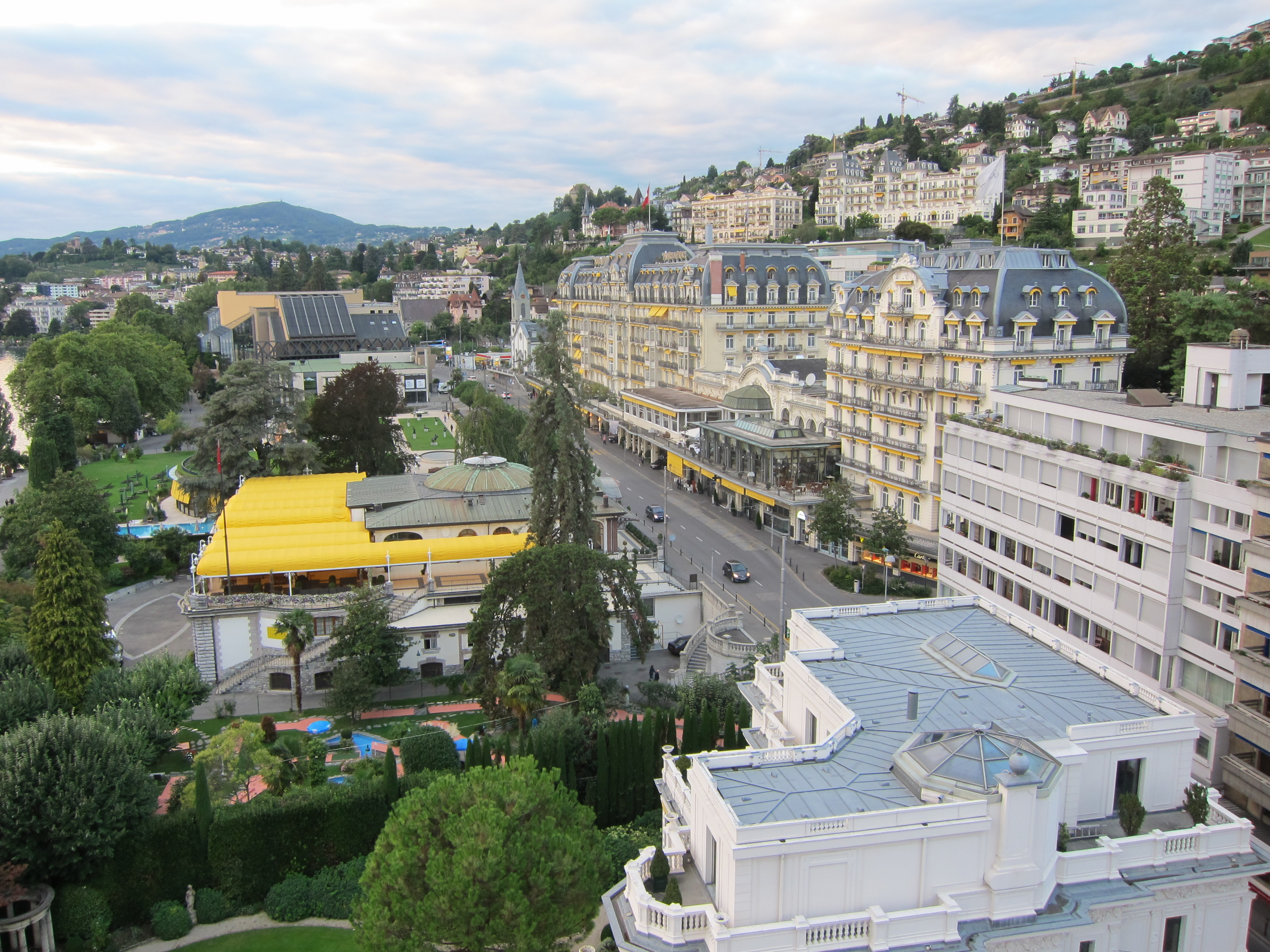 Fairmont Le Montreux Palace, Switzerland